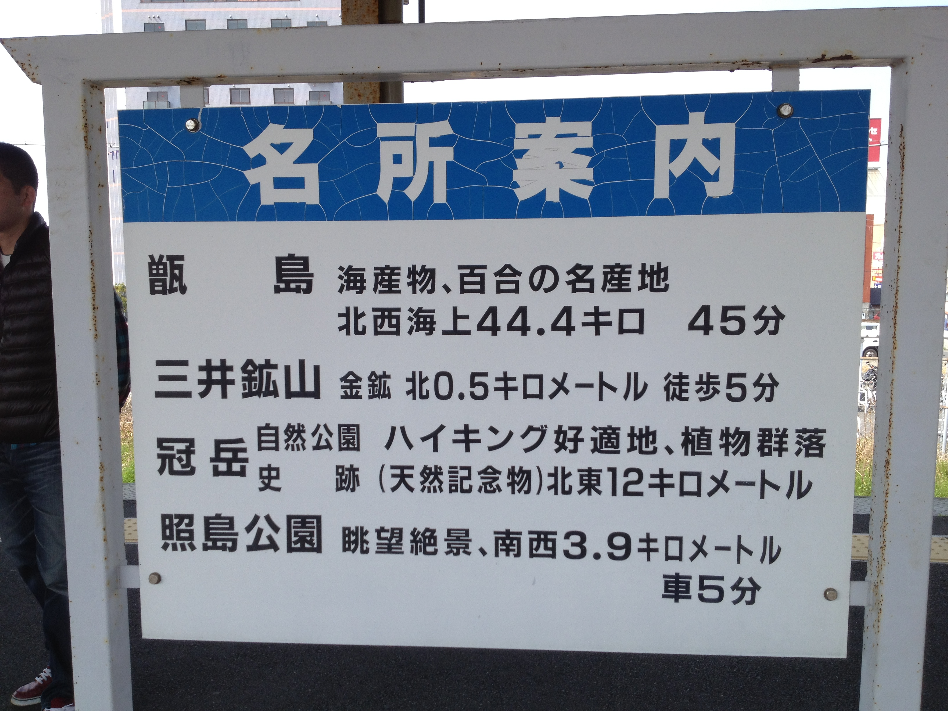 串木野駅 名所案内